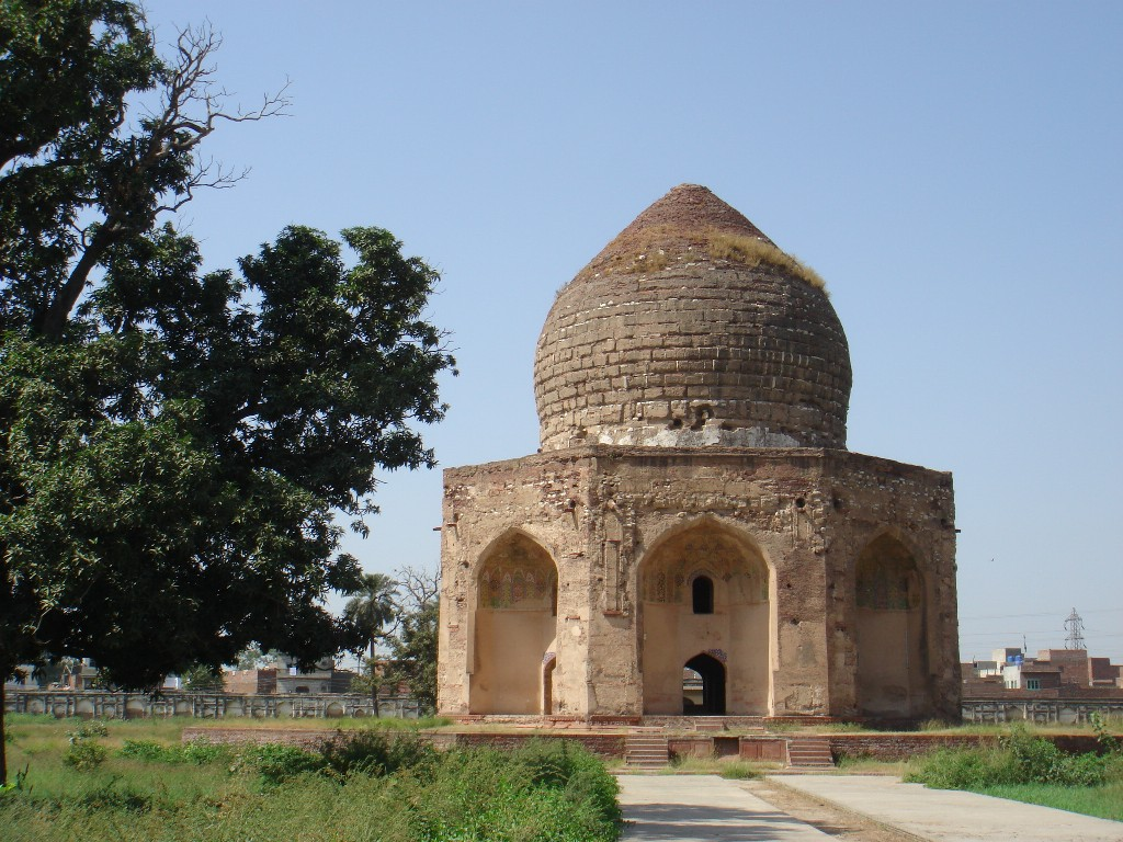 Asif Khan Mausoleum